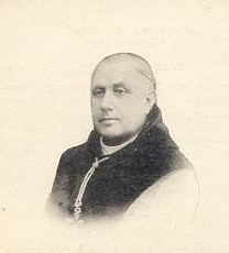 Henri Wyart (né le 12 octobre 1839 à Bouchain), chevalier de la Légion d'Honneur, capitaine des Zouaves pontificaux et Abbé Trappiste, il décède le 18 août 1904 à Rome.